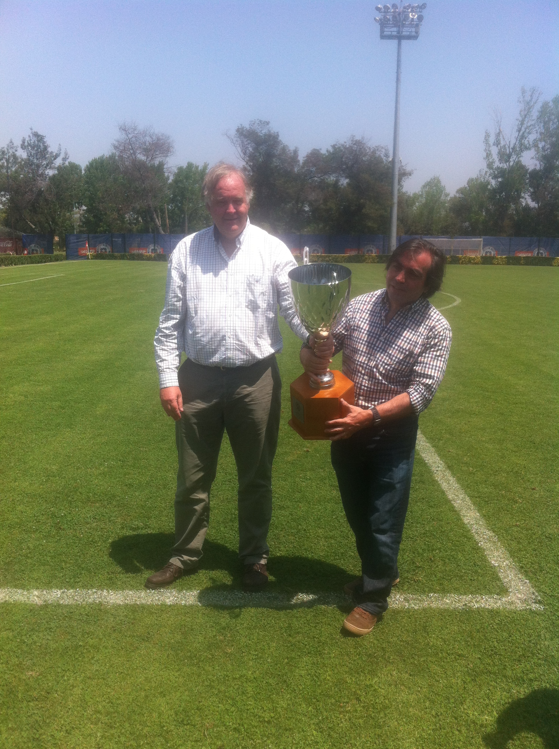 Fotografía de Jorge Lafrentz, presidente del Club de Deportes Santiago Wanderers, y Jorge Carrasco, presidente de la comisión fútbol del mismo club.